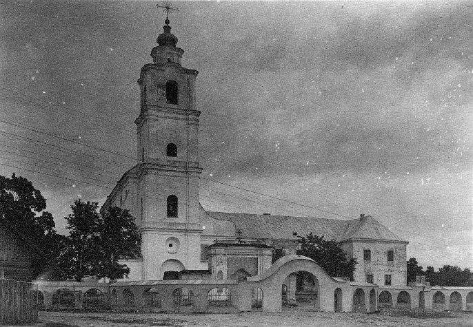 Беларуская (тарашкевіца): Друя (Druja), вуліца Сапежынская (vulica Sapiežynskaja). Касьцёл і кляштар бэрнардынаў